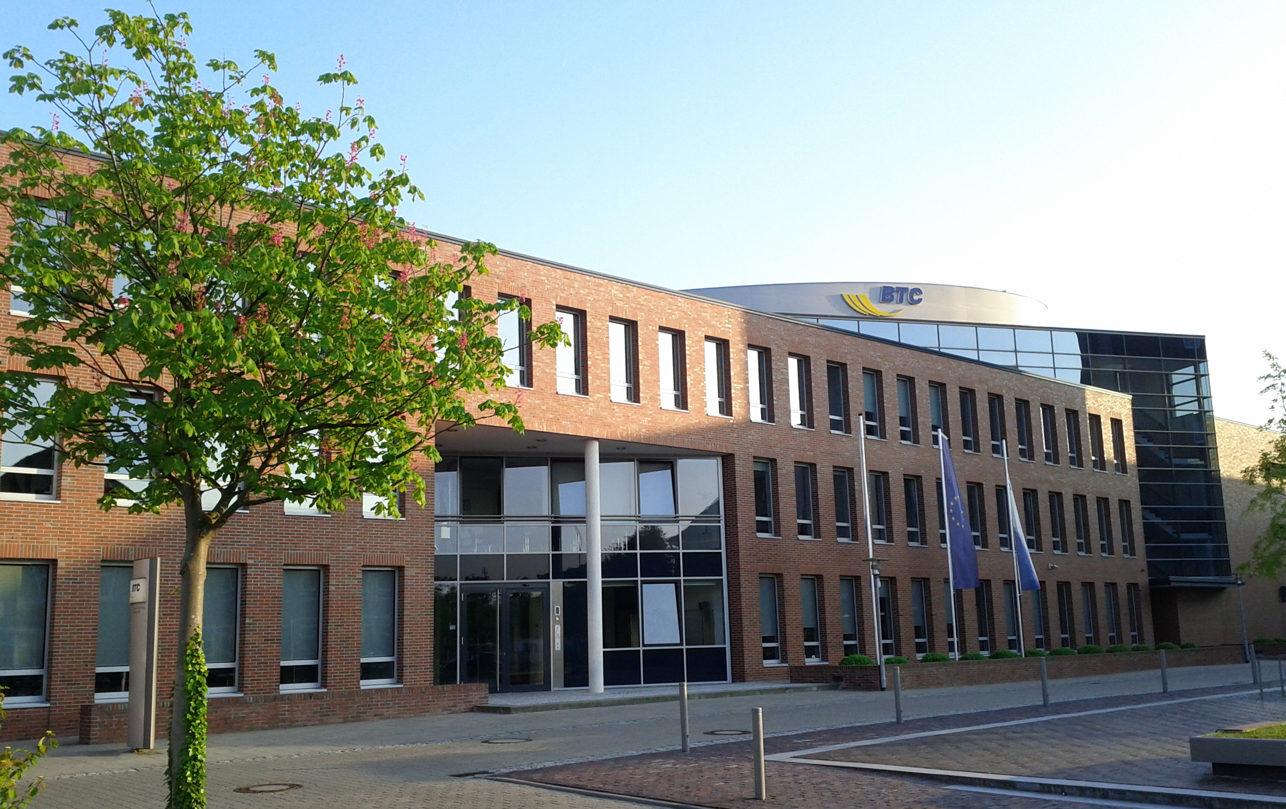 Gebäude der BTC AG